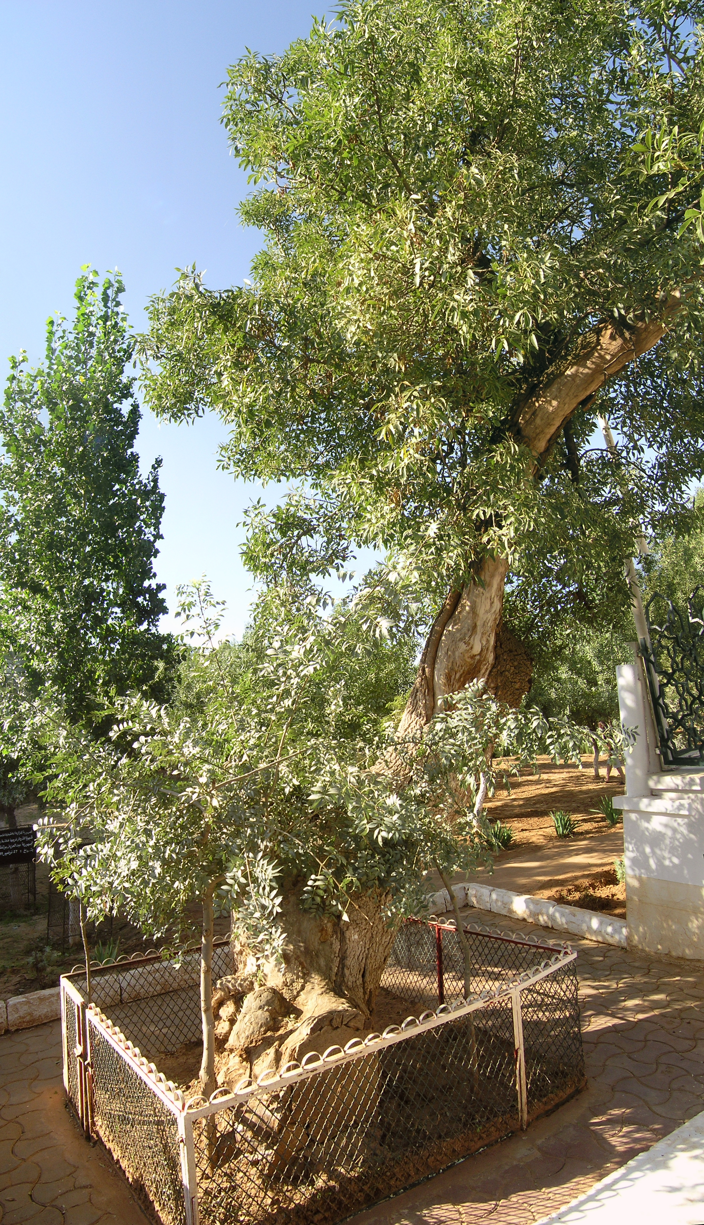 Site de Dardara Site.Commemo./ (Mod Ghriss)